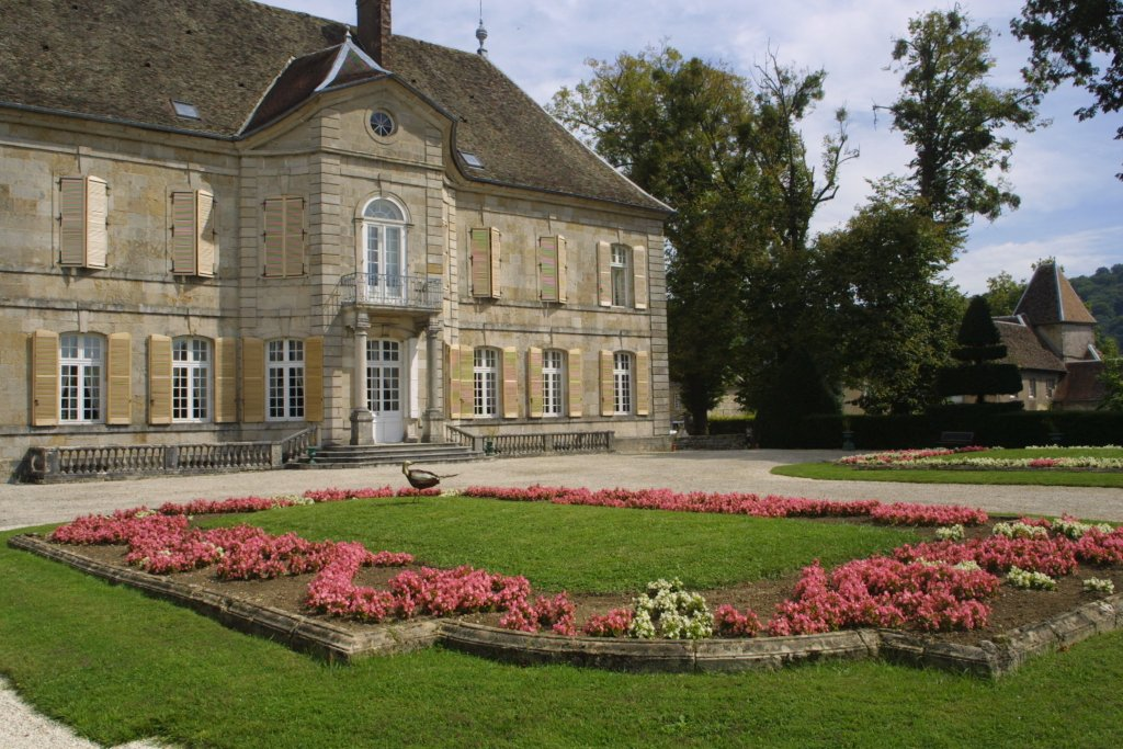 Château & Jardins de Vaire-Le-Grand - Franche Comté - France